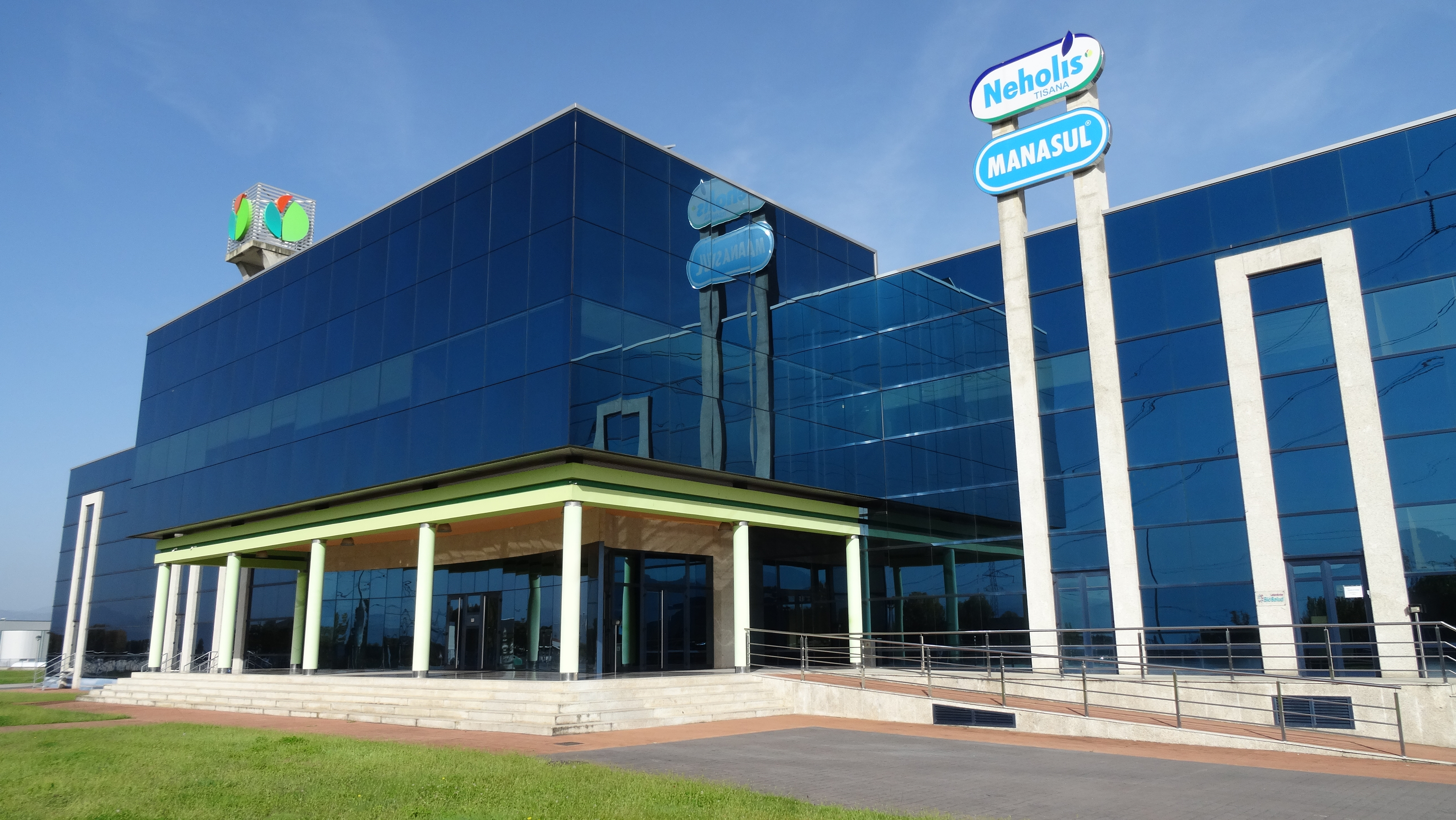 Fabrica Pharmaus 01